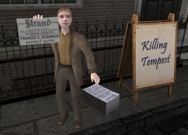 Capture d'écran du jeu Sherlock Holmes : la Nuit des Sacrifiés. Capture prise dans Baker Street, alors qu'un jeune garçon essaie de vendre ses journaux intitulés "Le Strand" - un clin d'œil à l'univers holmésien.